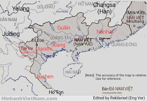 Bản chính thức Tiếng Anh